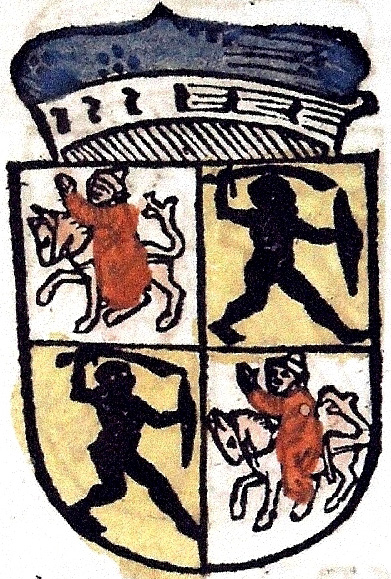 Беларуская (тарашкевіца): Герб Вітаўта Вялікага (Vitaŭt Vialiki) з «Пагоняй» («Pahonia») з кронікі Ульрыха Рыхэнталя